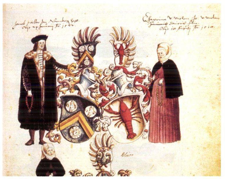 Melemsches Hausbuch, Institut für Stadtgeschichte der Stadt Frankfurt am Main, Holzhausen Archiv K. 170, fol. 17 r., Jakob Heller ( † 1522) und Ehefrau Katharina Melem ( † 1518)